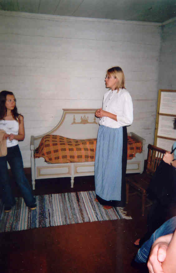 Pajala prästgård, juli 2004. Guidning av en finskspråkig grupp från Uleåborgs universitet.